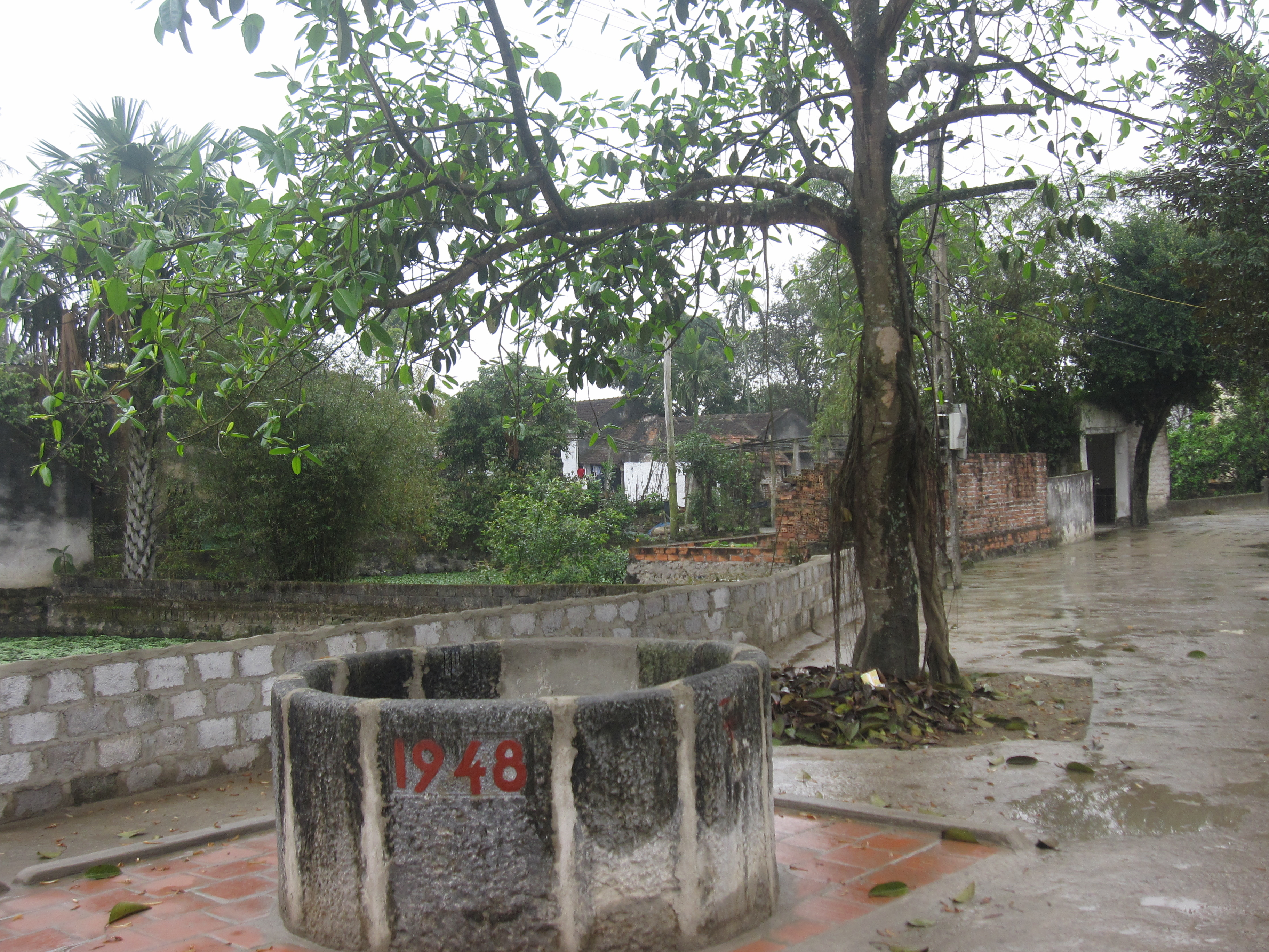 Cây đa, giếng nước làng Tuyên Hóa, xã Đông Anh, Đông Sơn, Thanh Hóa, Việt Nam